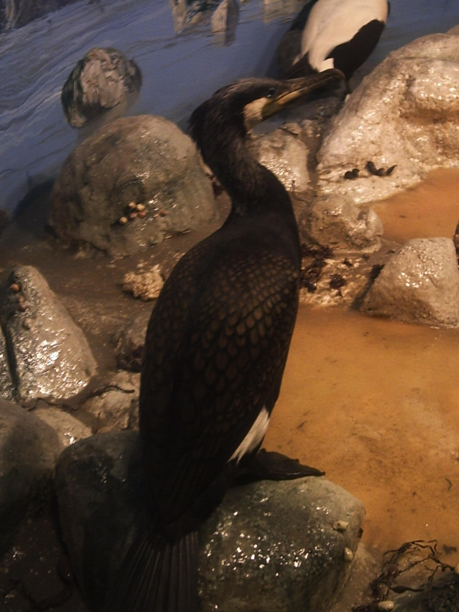 Cormoran - Vitrine de la Maison de la Baie de Somme et de l'Oiseau à Lanchères.